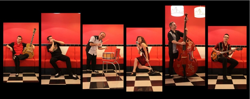 Lazy Buddies